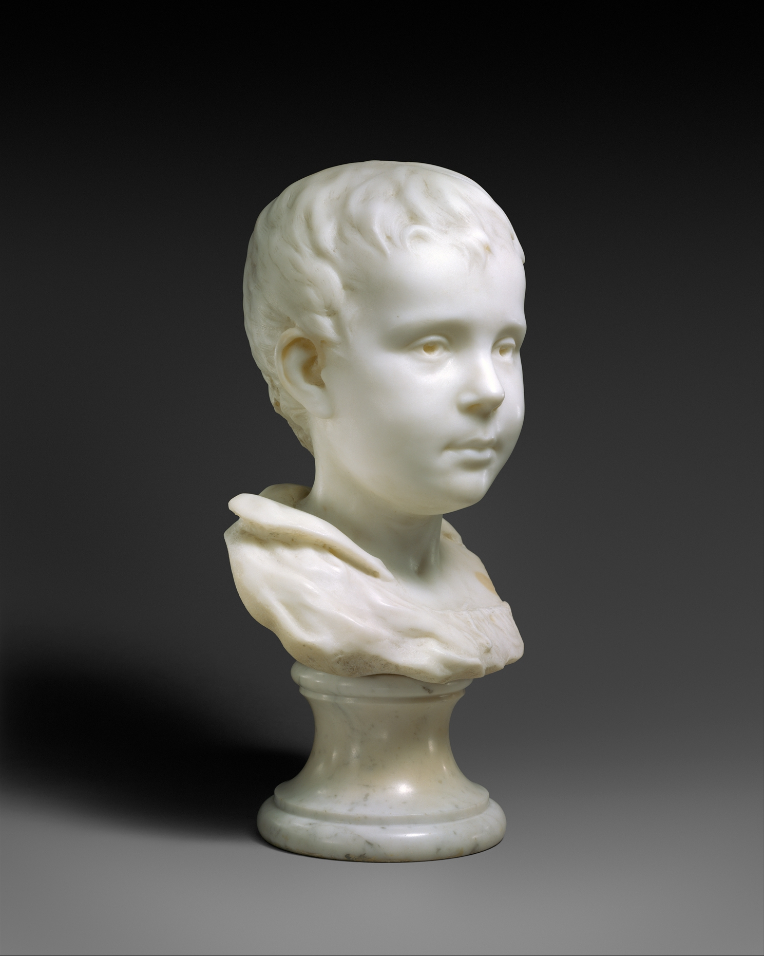 French; Bust; Sculpture